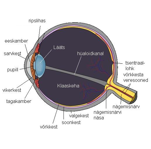 Silma läbilõige